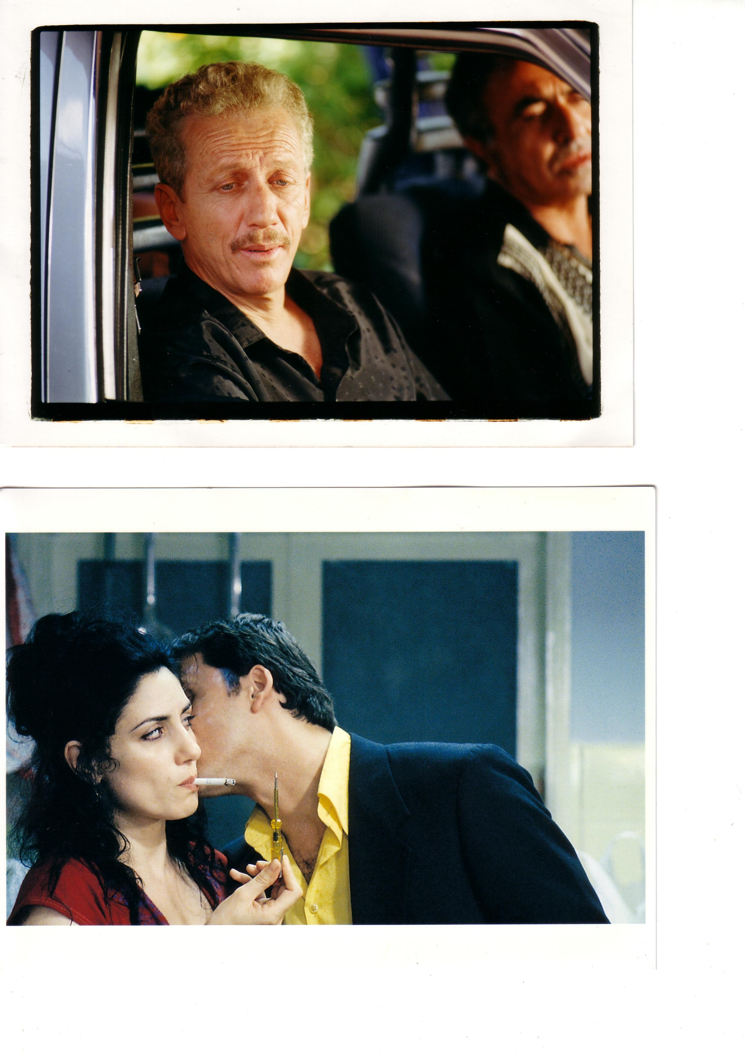 מוני מושונוב, ליאור אשכנזי ורונית אלקבץ בסרטו של דובר קוסאשווילי "חתונה מאוחרת" 2001